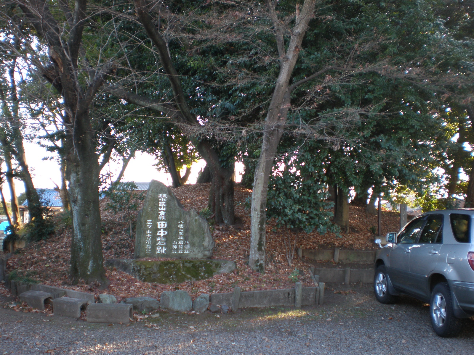 愛知県小牧市にある三ッ山古墳群と田中砦跡